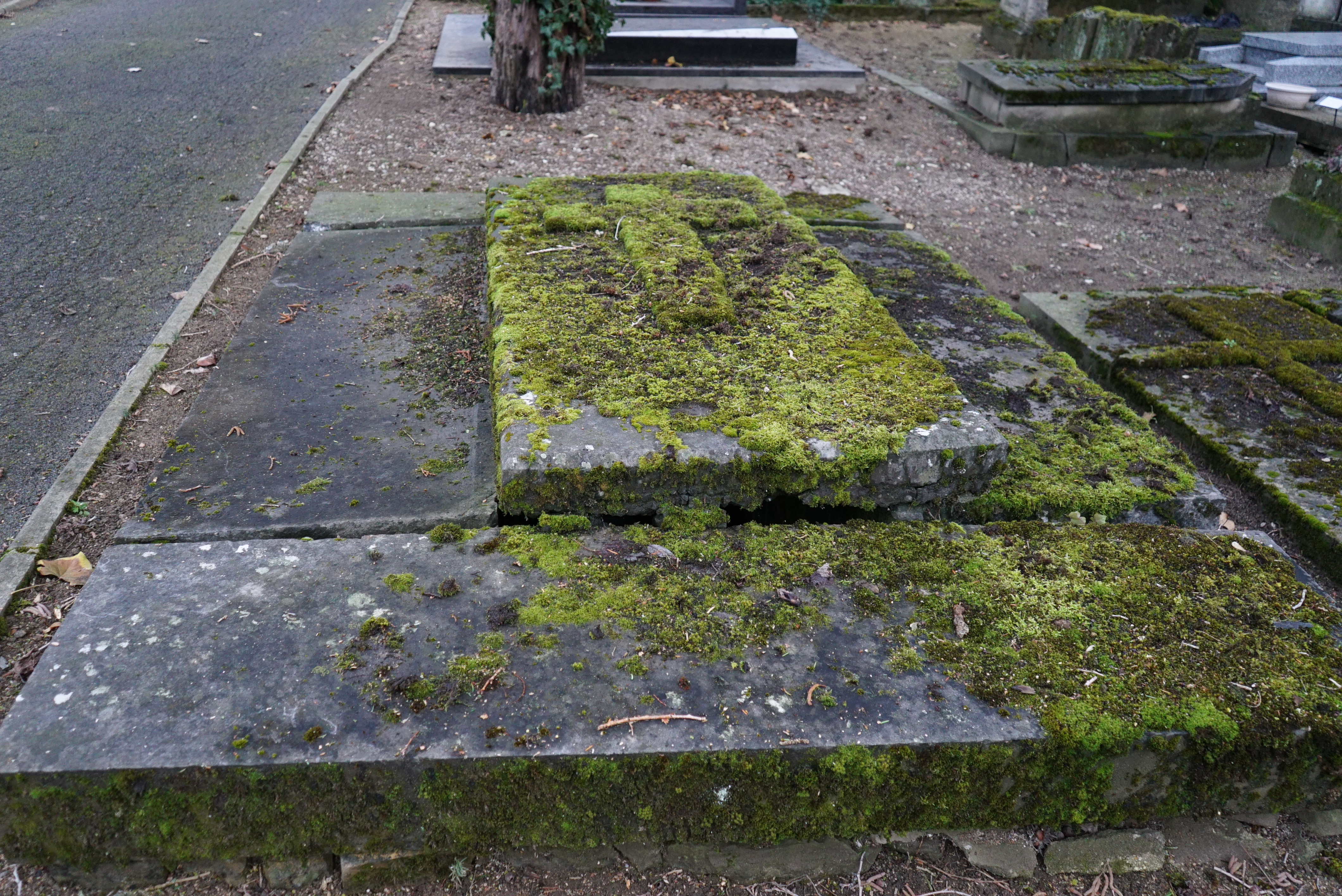 tombe des époux Doyen Doublié cantonn 1